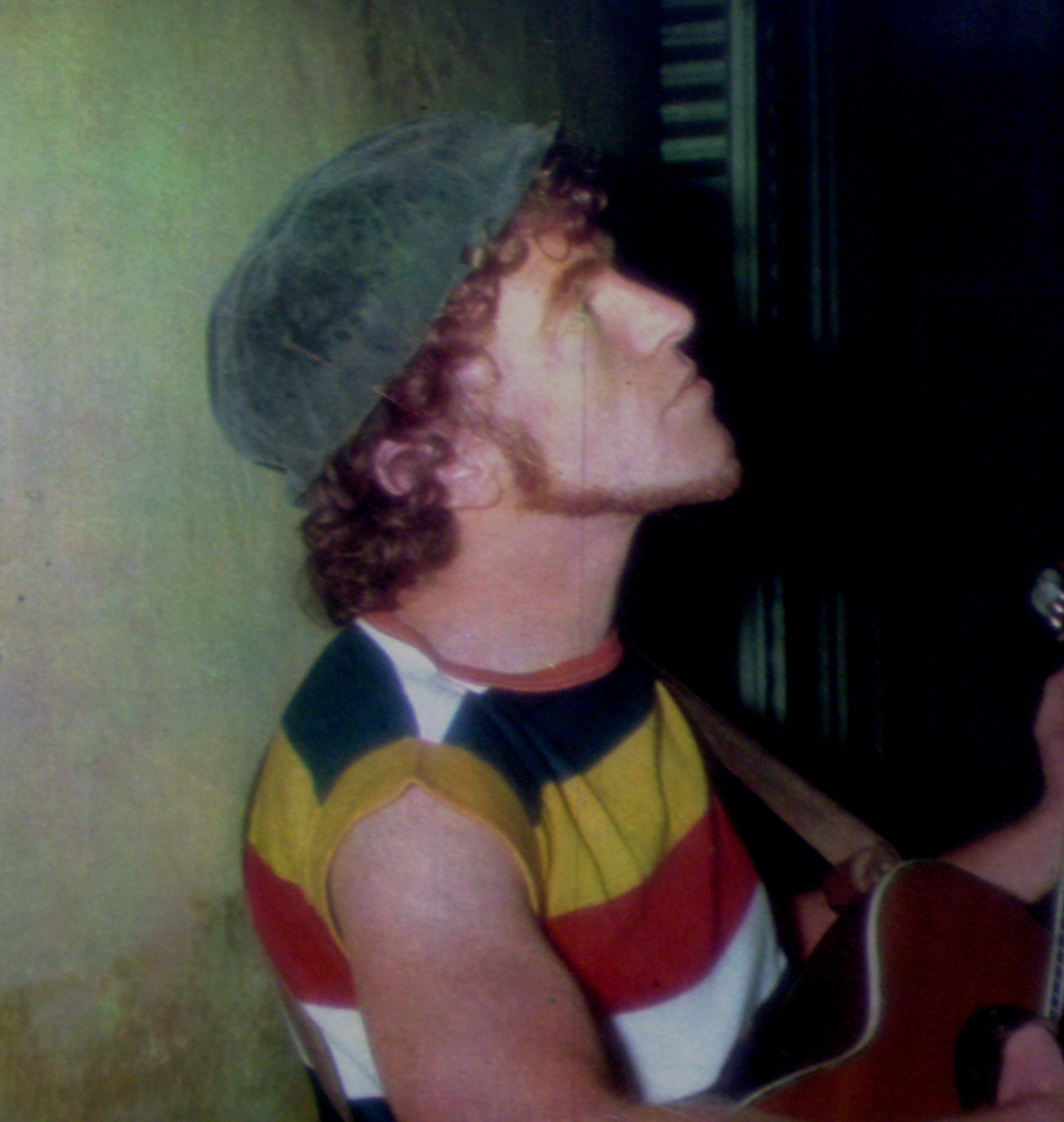 Miguel Cantilo